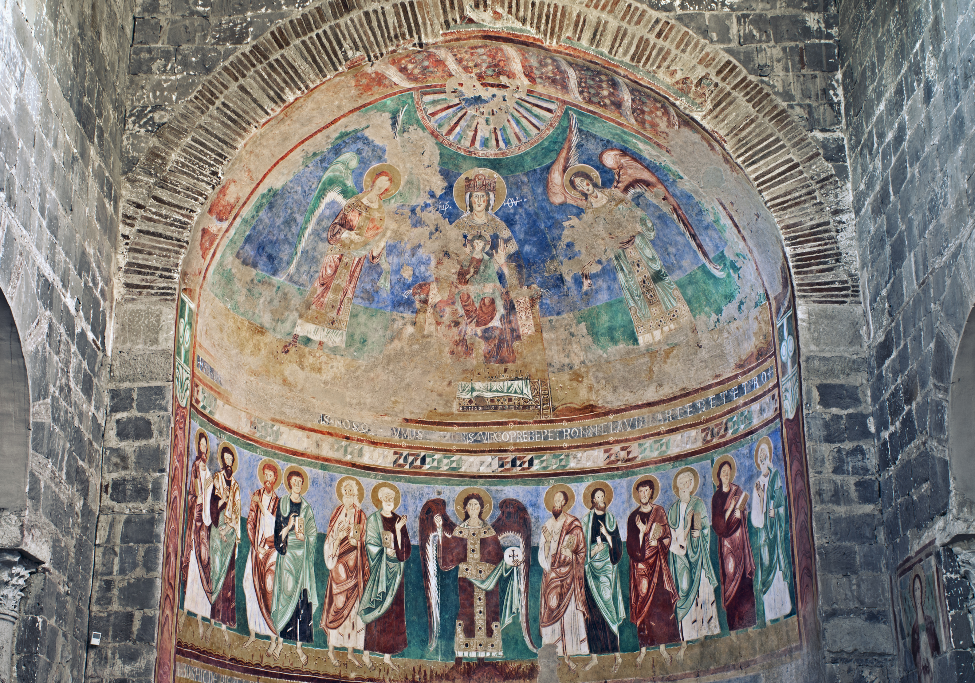 Catino absidale di S.Maria in Foro Claudio, a cura del Circolo socio-culturale Caleno